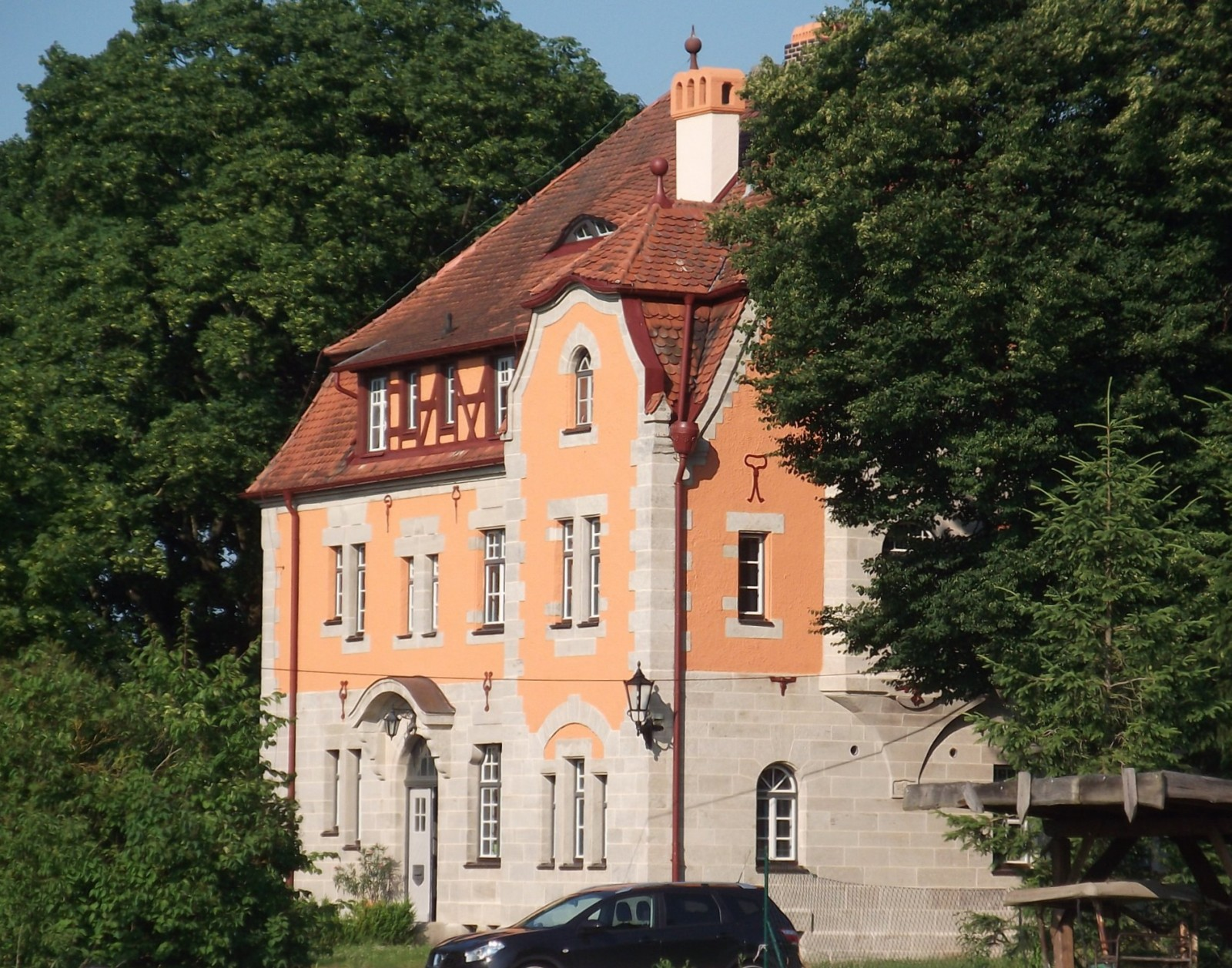 ehemaliger Bahnhof Uehlfeld-Demantsfürth